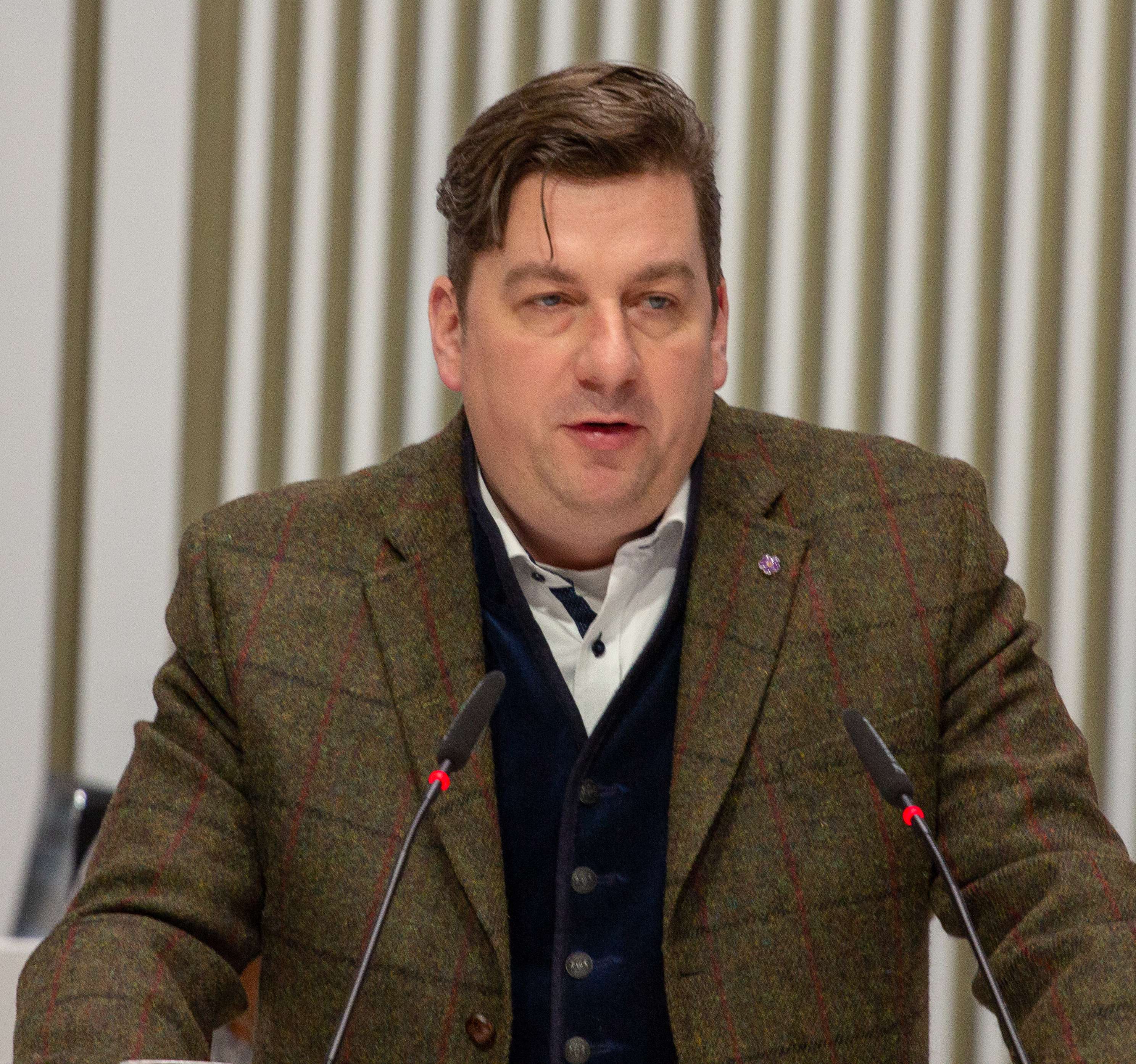 Holger Arppe im Rahmen der Plenarsitzung des Landtages Mecklenburg-Vorpommern am 13. März 2019 in Schwerin.